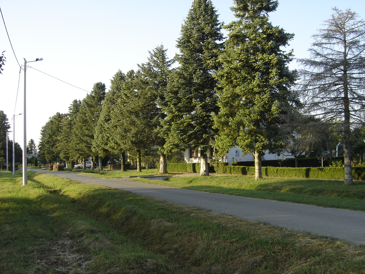 Naselje hrvatskih branitelja